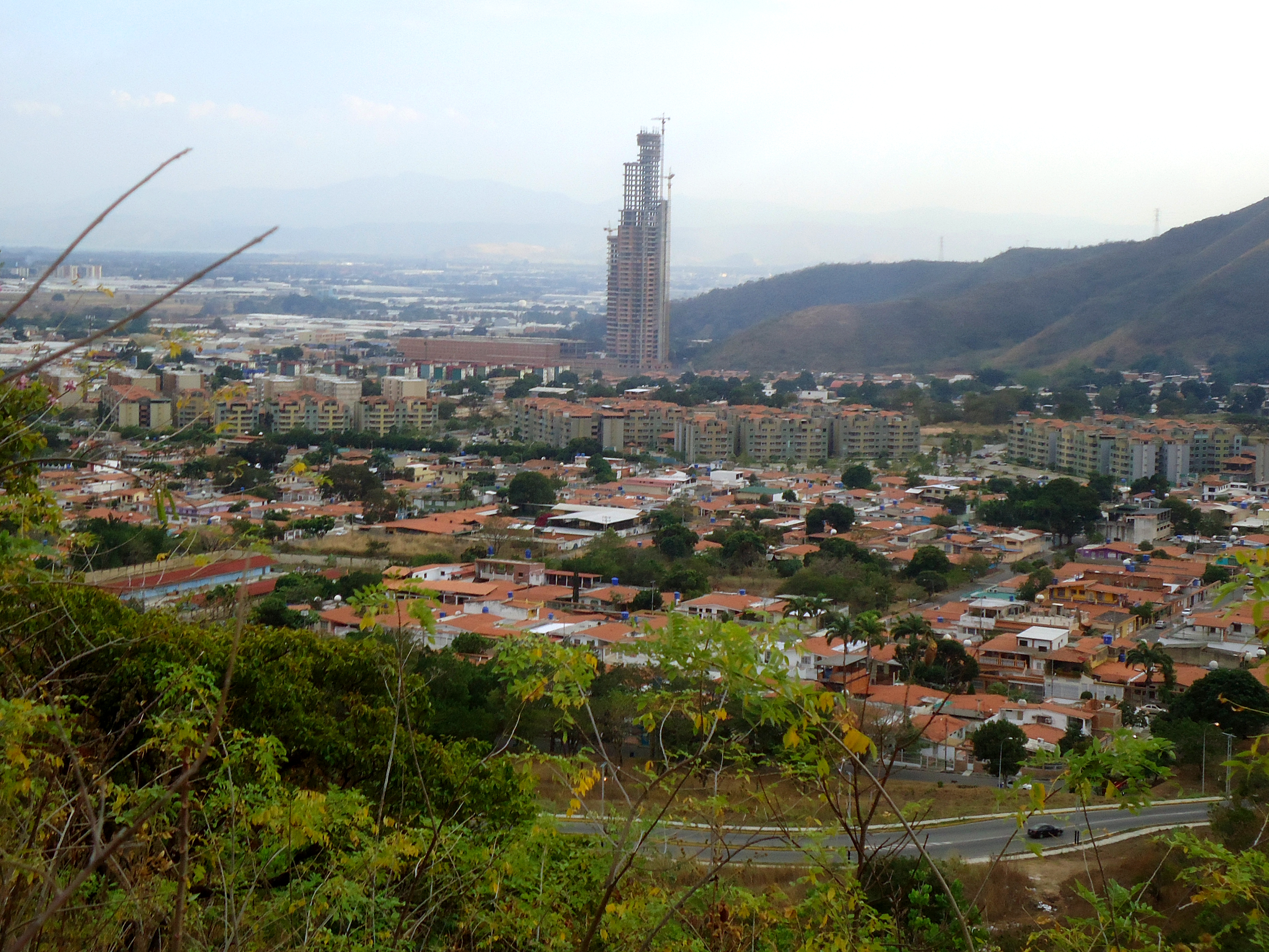 Fotografía tomada desde el cerro de San diego donde se observa la construcción de la torre que será la más alta del municipio San Diego, Carabobo.